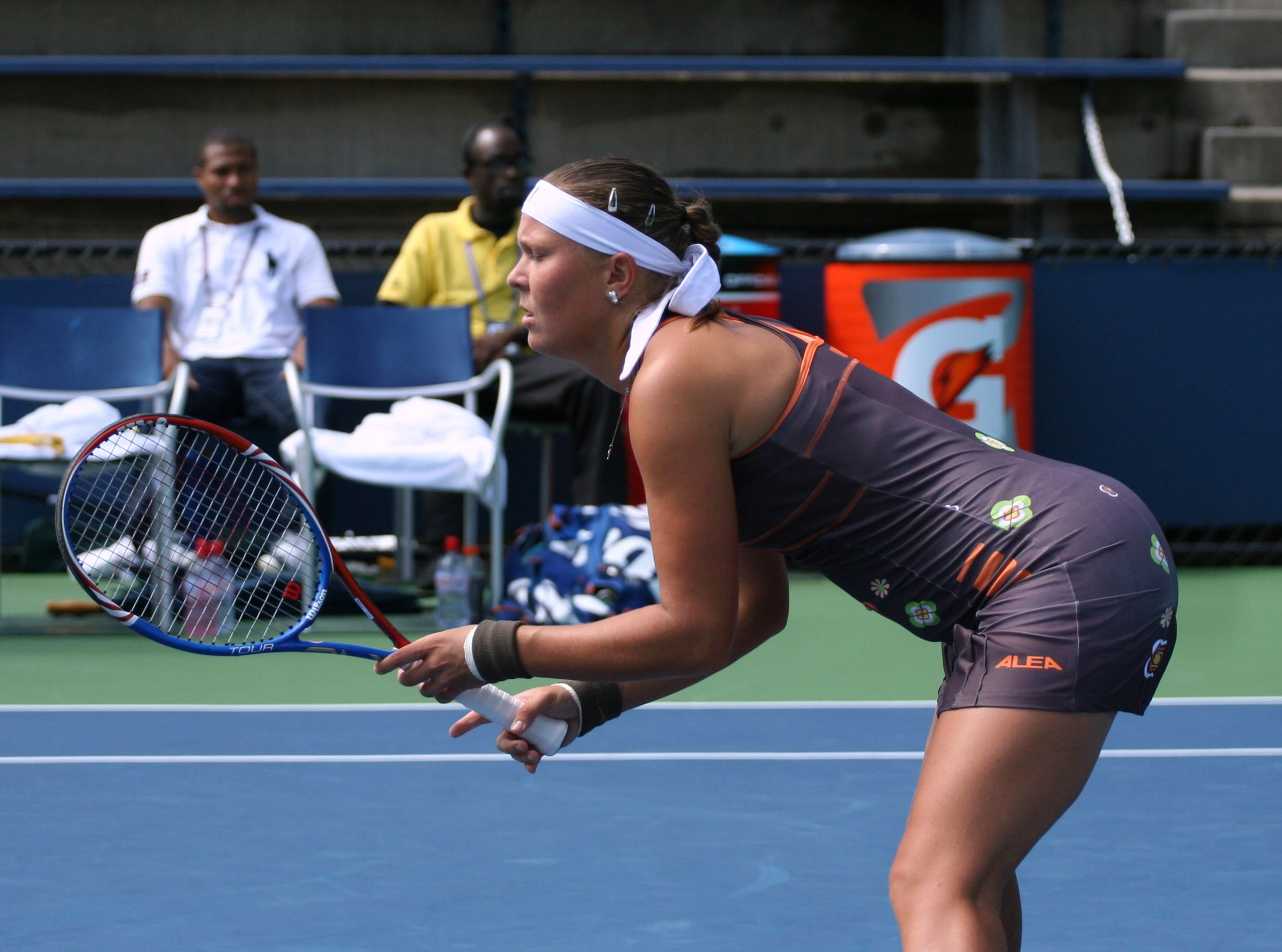 Emiliàn e rumagnòl: La Lucie Hradecká tòlta śò durànt gl'US Open dal 2011